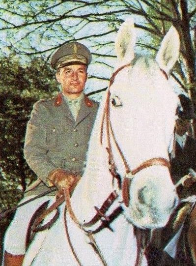 CAMPIONI dello SPORT 1969/70-n.414- ANGIONI - ITALIA -EQUITAZIONE